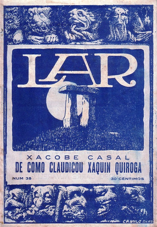 35 De como claudicou Xaquín Quiroga. Xacobe Casal. Lar. 1927.jpg